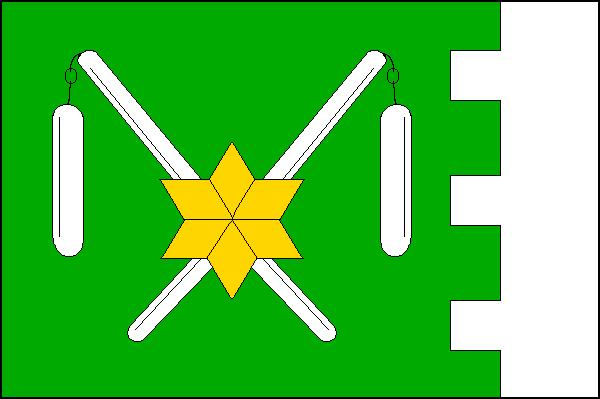 Vlajka obce Hradec-Nová Ves